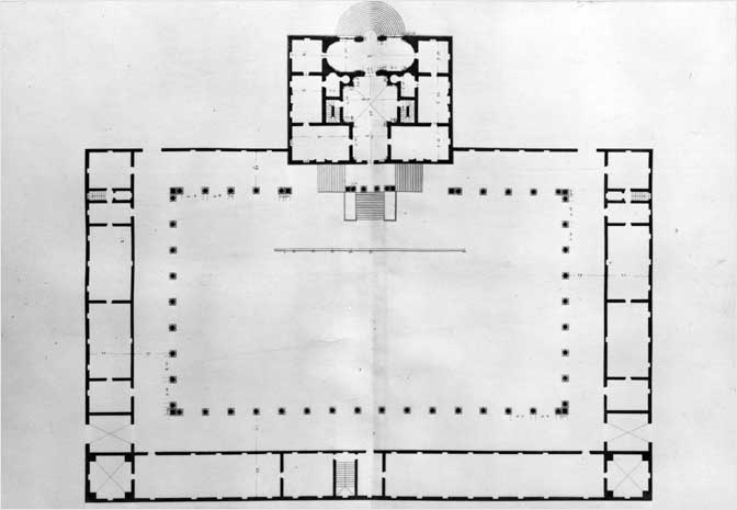 Villa Pisani a Bagnolo di Lonigo (Vicenza). Disegno da Ottavio Bertotti Scamozzi, 1778